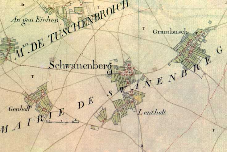 Map of Mairie de Schwanenberg (Germany); Kartenaufnahme des Rheinlands von Tranchot/Müffling, (Aufnahme von 1806/07)